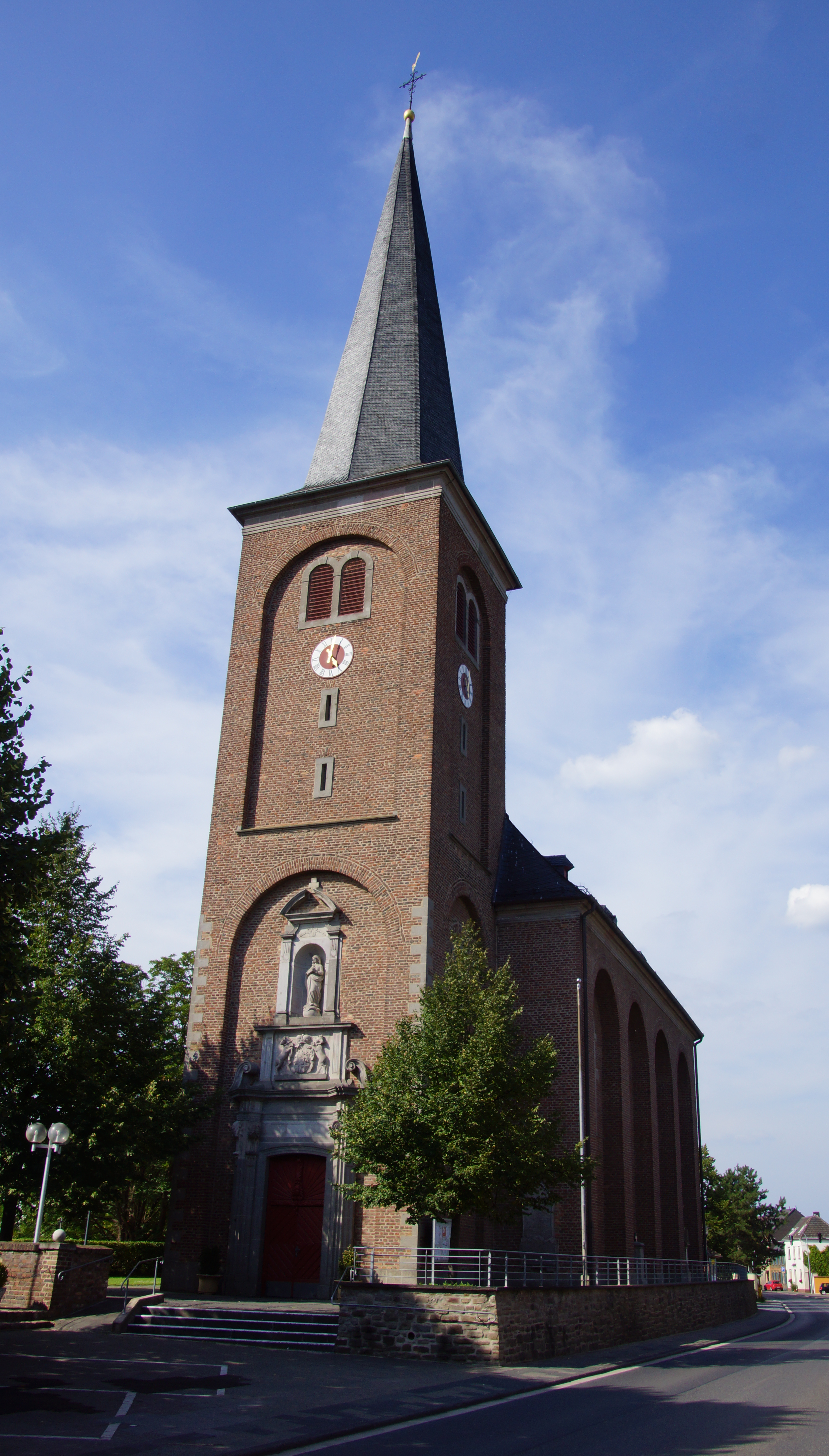 Heilig-Kreuz-Kirche Vernich, Trierer Straße